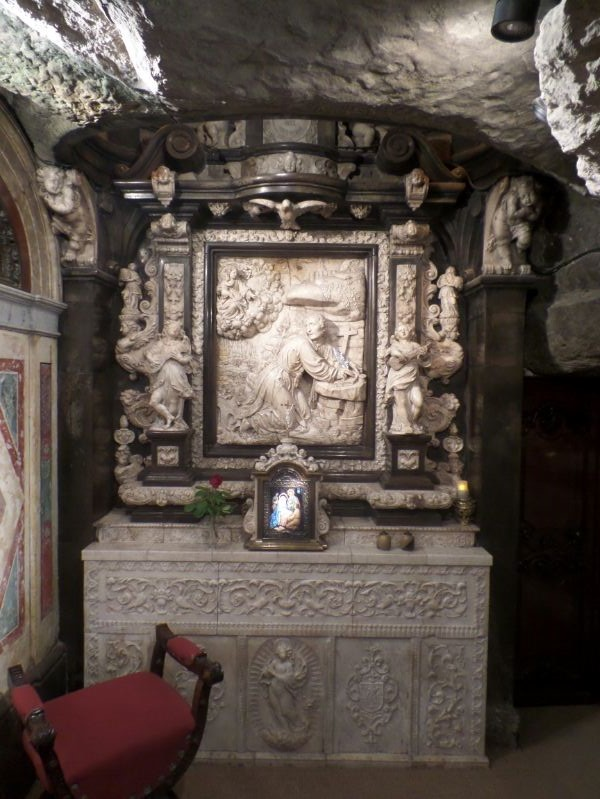 Relleu del Rapte de Sant Ignasi a la Santa Cova de Manresa